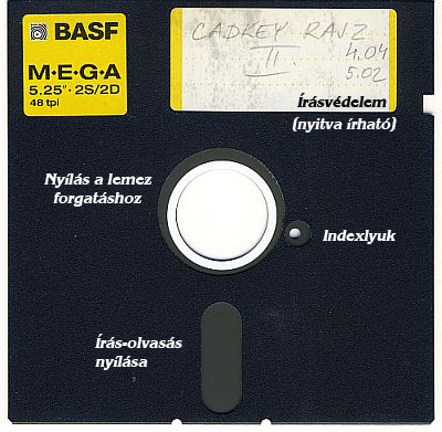 BASF MEGA márkájú 5,25"-es flopi magyarázó feliratokkal